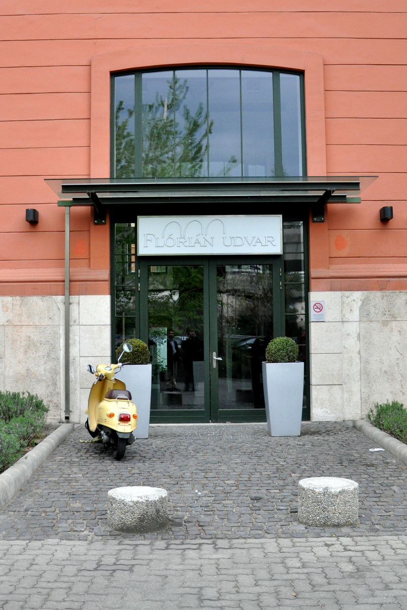 Flórián Udvar, Flórián tér, Budapest